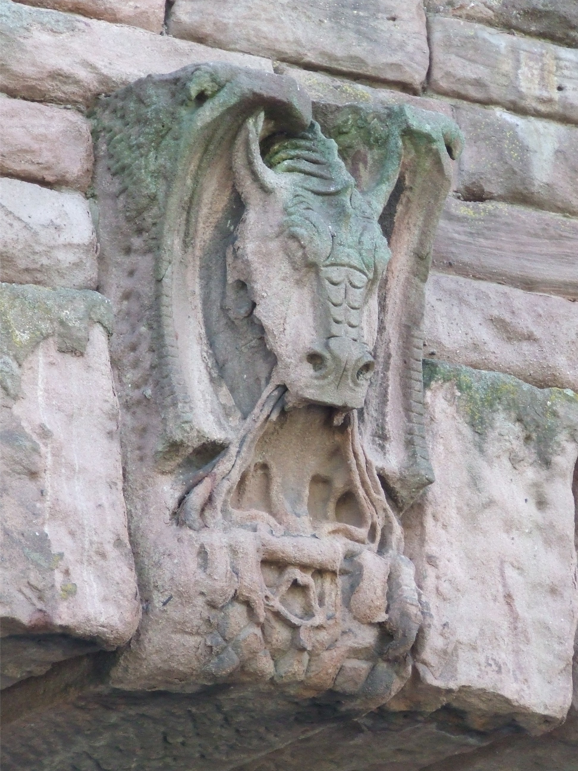 Kaiserbrücke zwischen Mainz und Wiesbaden